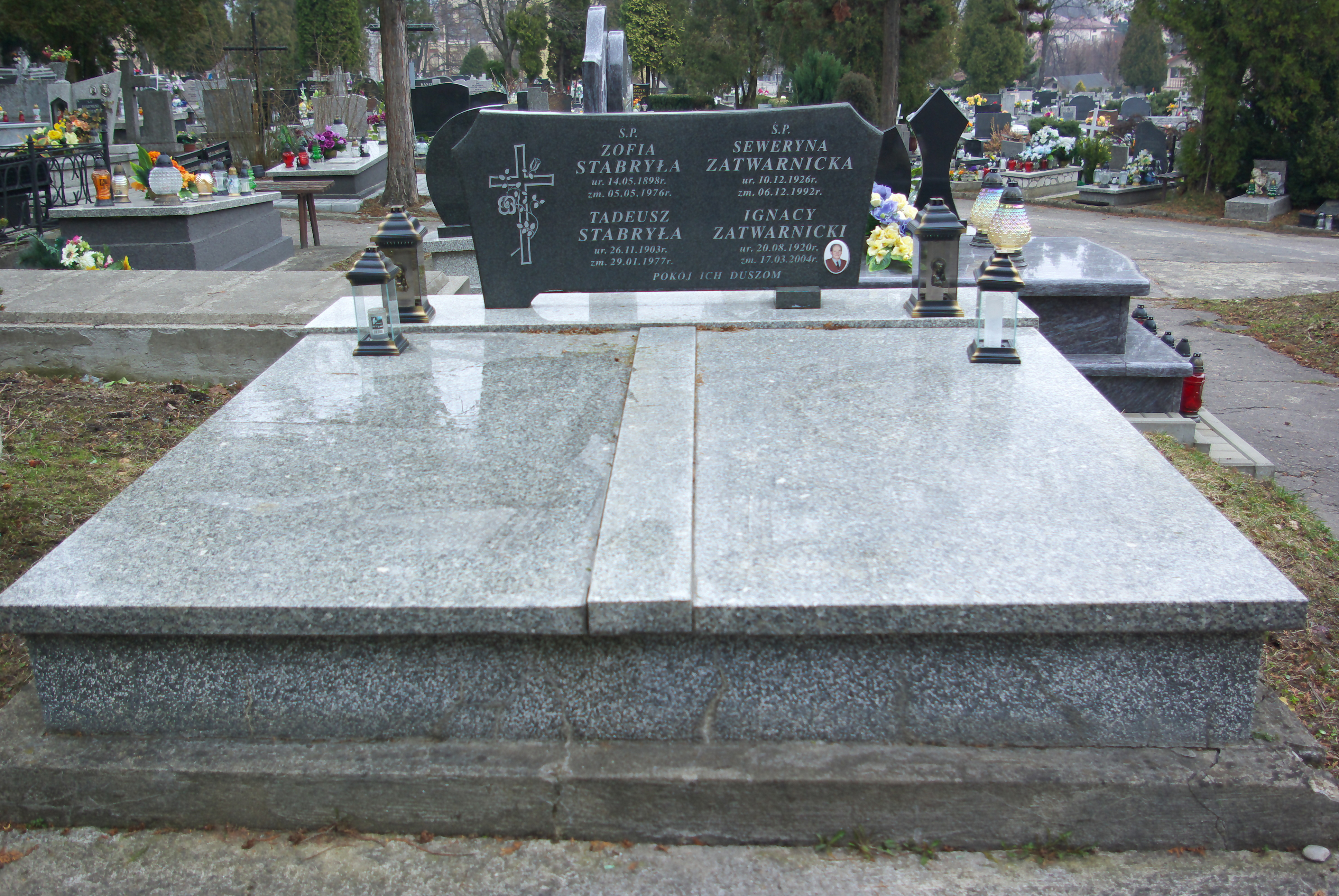 Grobowiec rodzin Stabryłów i Zatwarnickich na Cmentarzu Centralnym w Sanoku. Pochowany Ignacy Zatwarnicki.